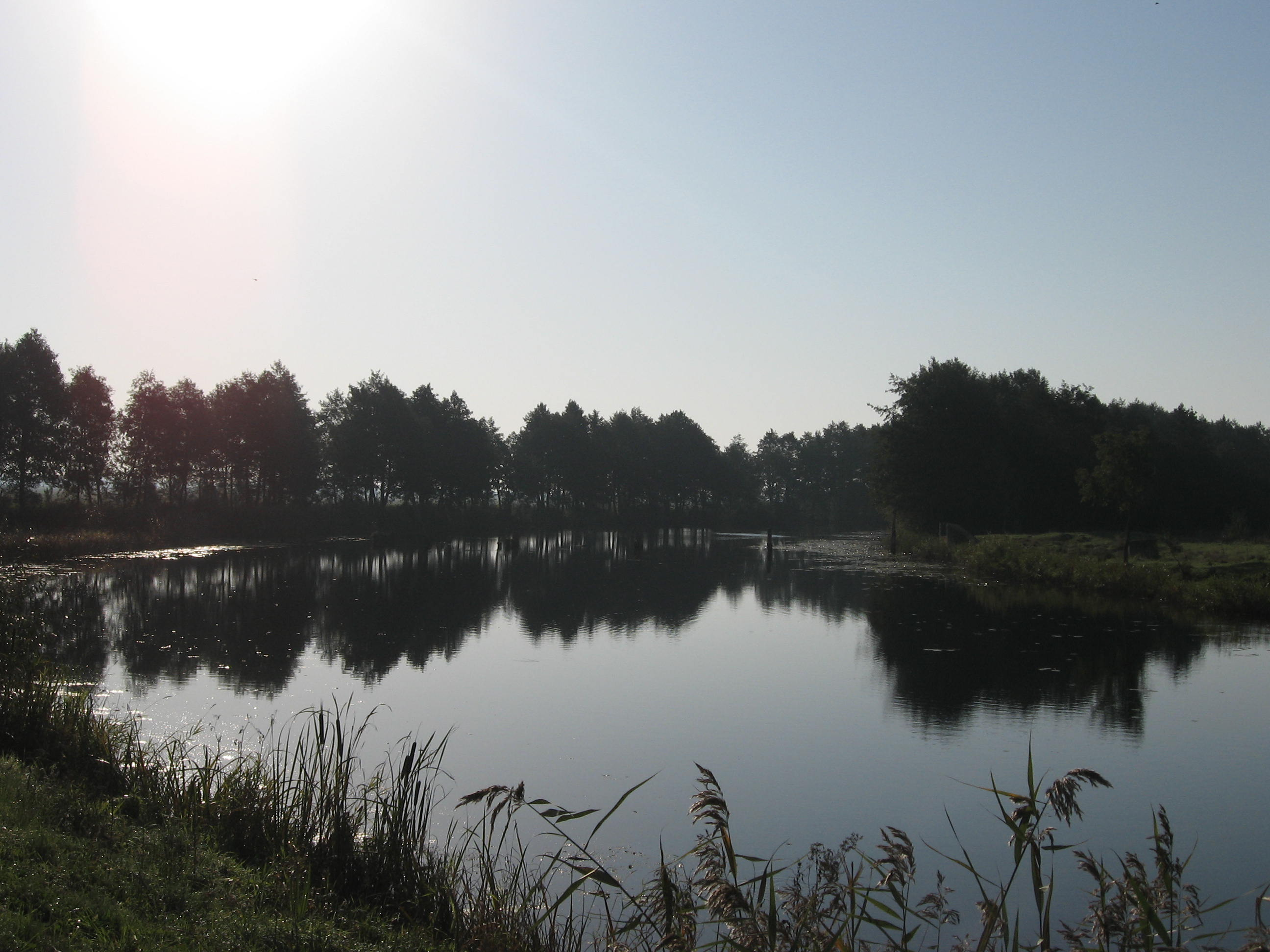 Mingės upė pamario krašte